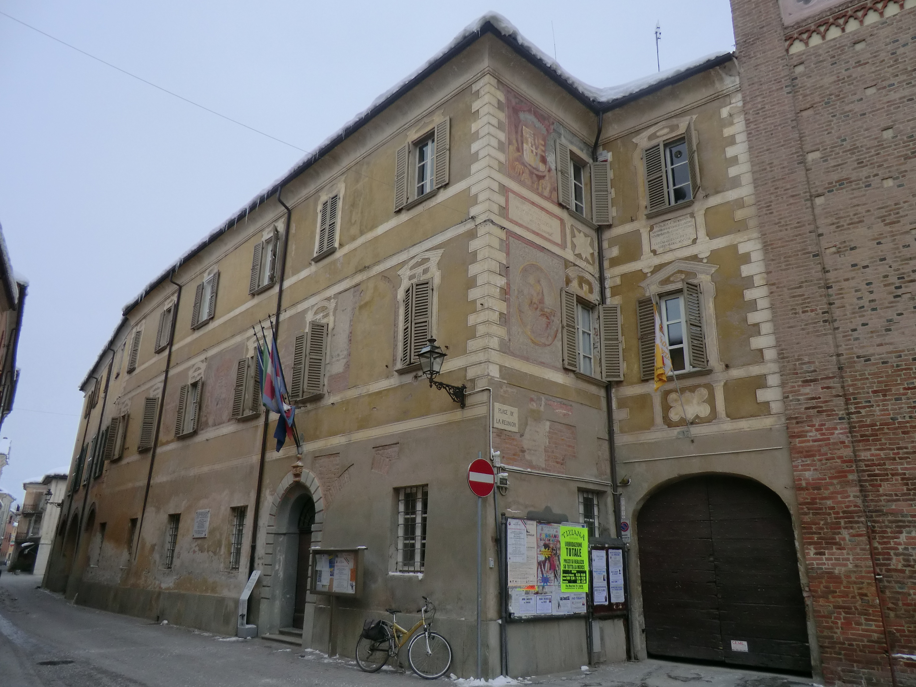 Bene Vagienna (Cuneo): municipio